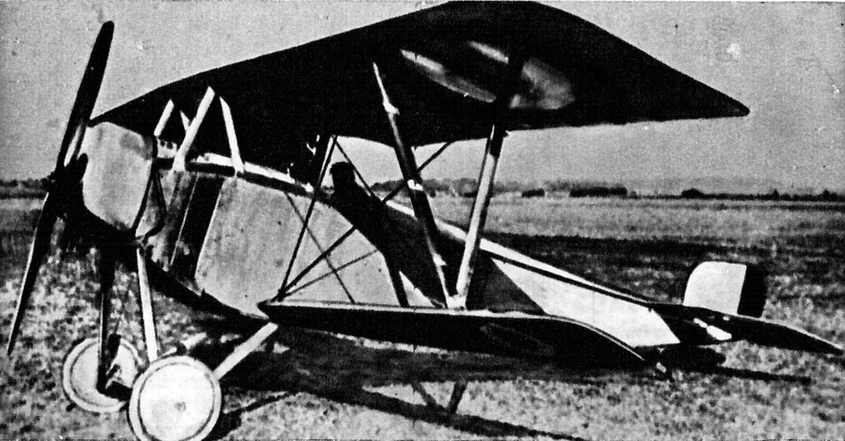 Francuski samolot myśliwski Nieuport 10C1.